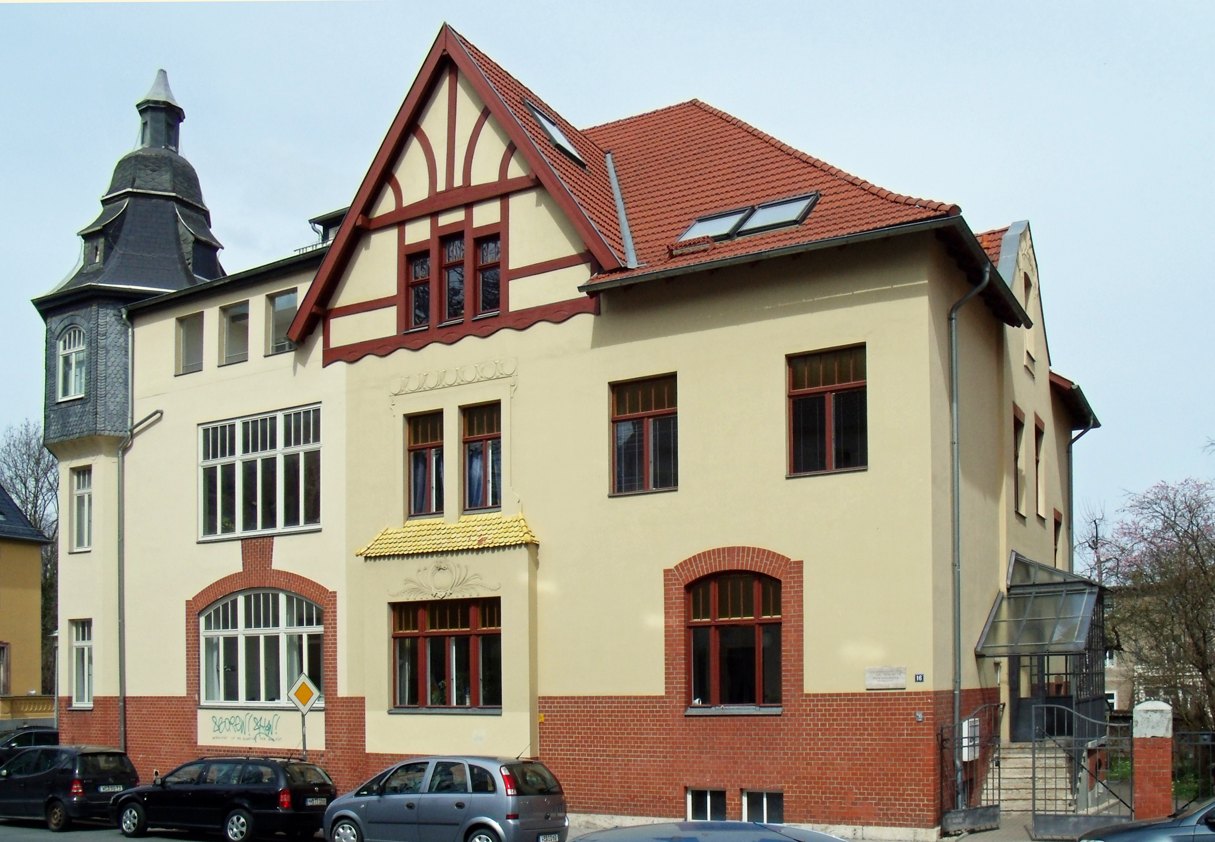 Bauhausmeister Lyonel Feininger (1871-1956) wohnte von 1919 bis 1926 in diesem Haus, das in der Denkmalliste der kreisfreien Stadt Weimar verzeichnet ist.